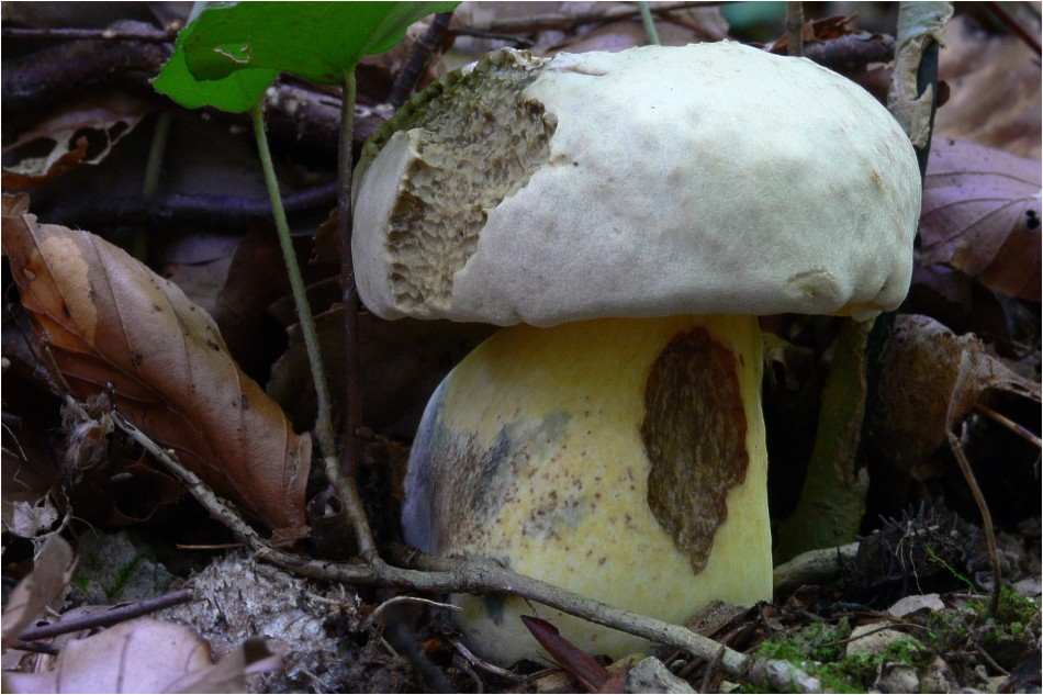 Wurzelnder Bitterröhrling (Boletus radicans)